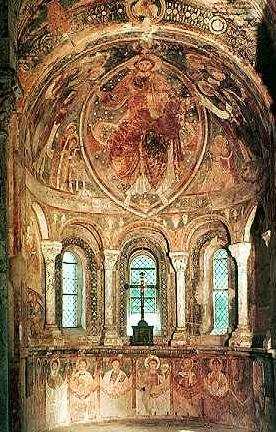 Berzé-la-Ville, Fresken in der Chapelle des Moines